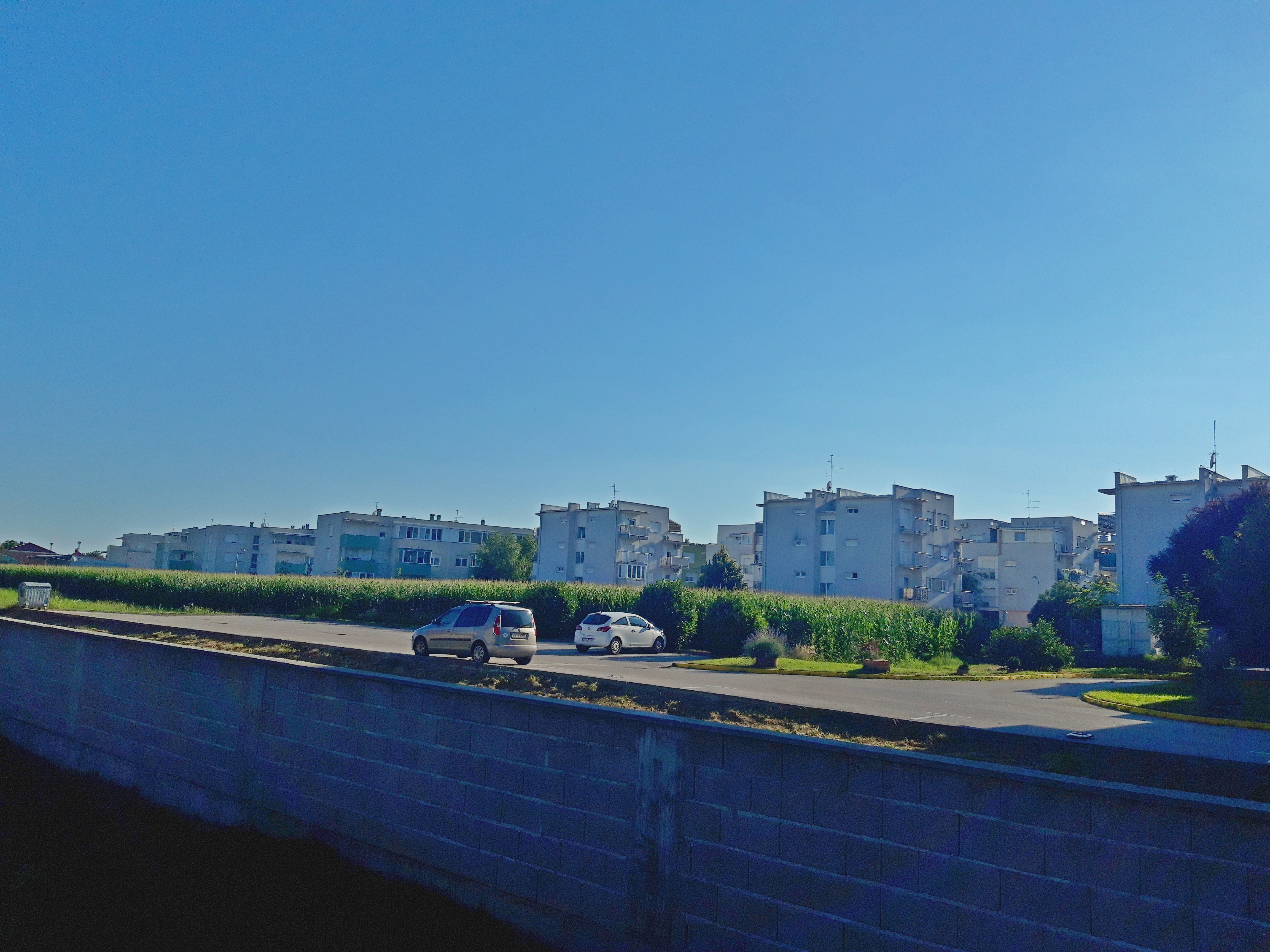 Jakuševec